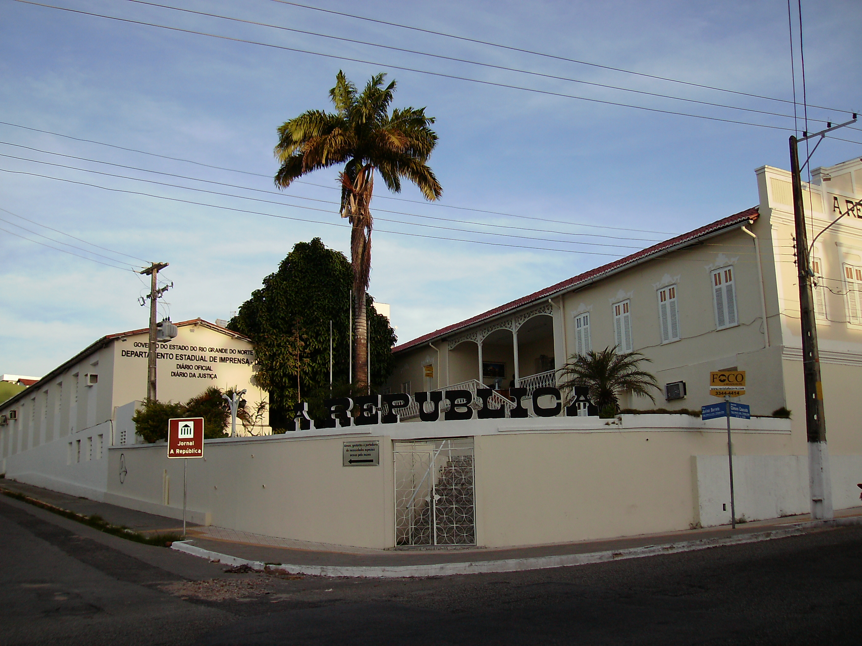 Centro Histórico de Natal